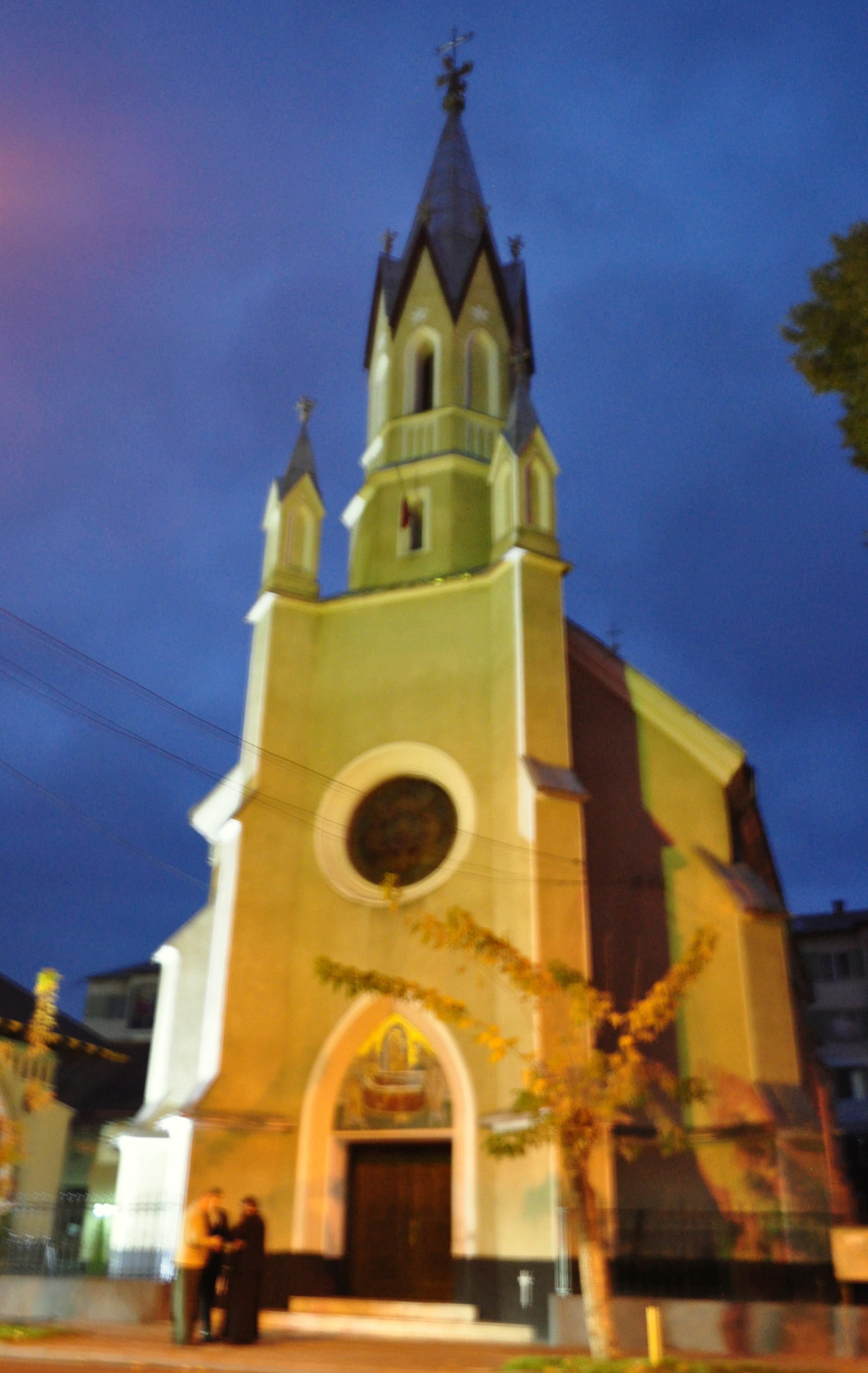 Biserica "Adormirea Maicii Domnului", municipiul Sighetu Marmației, Str. Dragoș Vodă 3 01